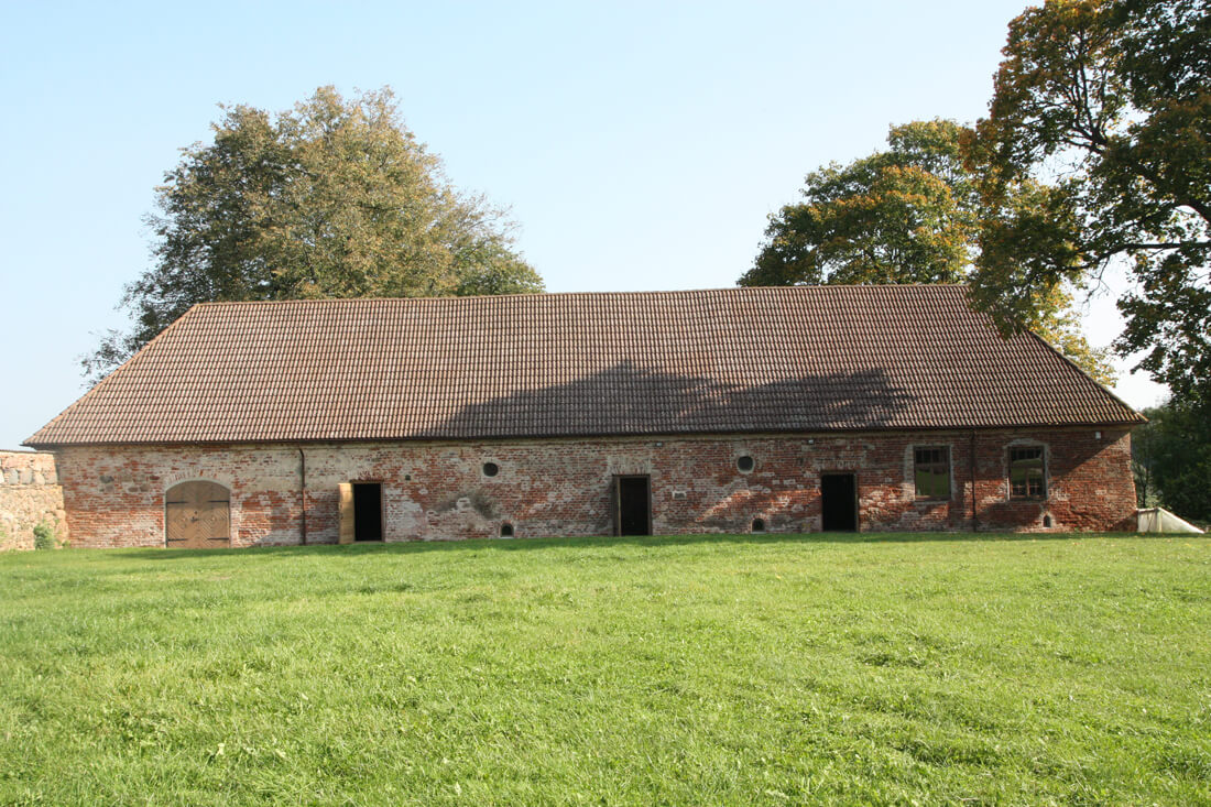 Vienuolyno svirnas